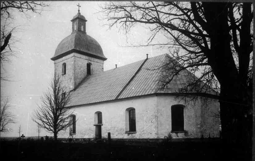 Fryele kyrka